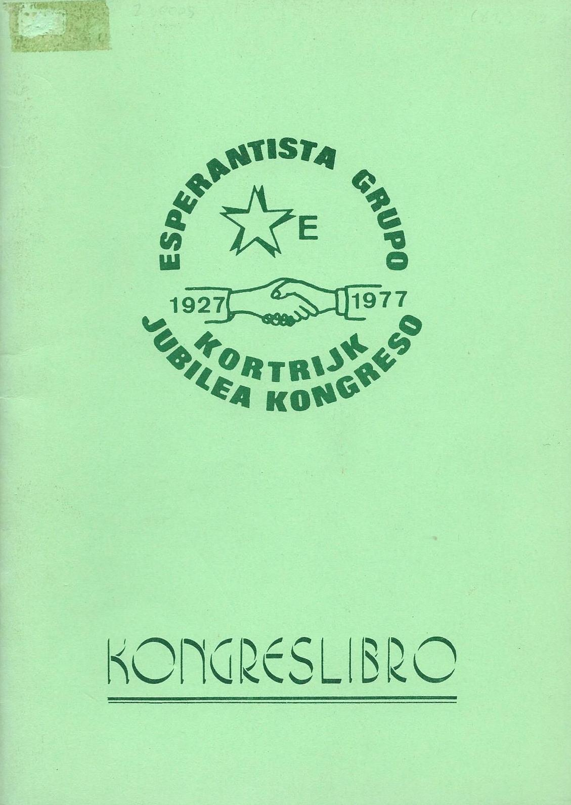 librokovrilo de "Kongreslibro Kortrijk", 1977